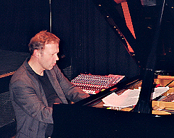 Photo des Freiburger Pianisten Lucas Heidepriem - erstellt am 06.November 2009 bei einem Konzert in Offenburg.